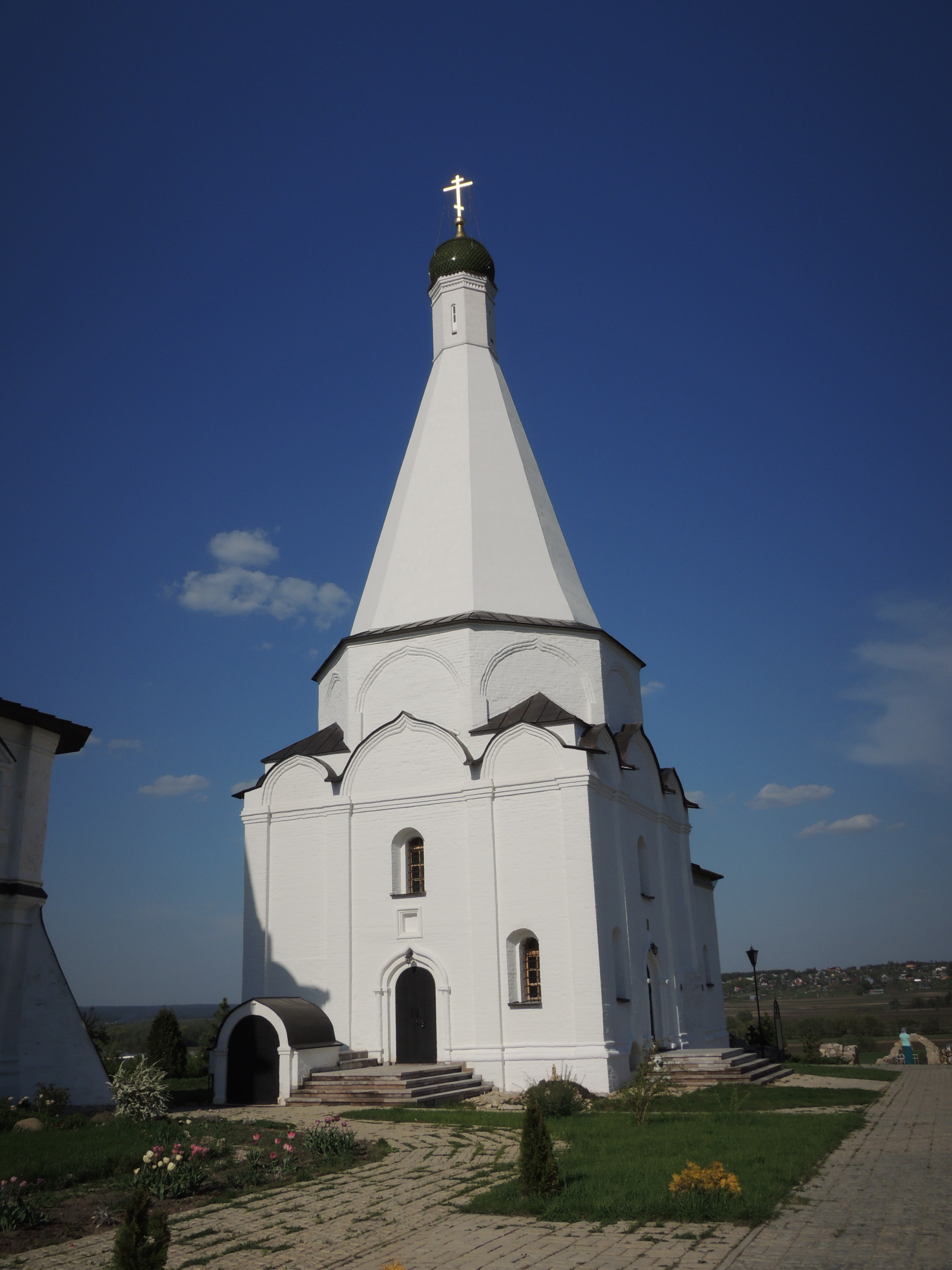 Спасо-Преображенский Воротынский монастырь (Спас на Угре, На-Усть-Угры-Спасо-Воротынский монастырь)